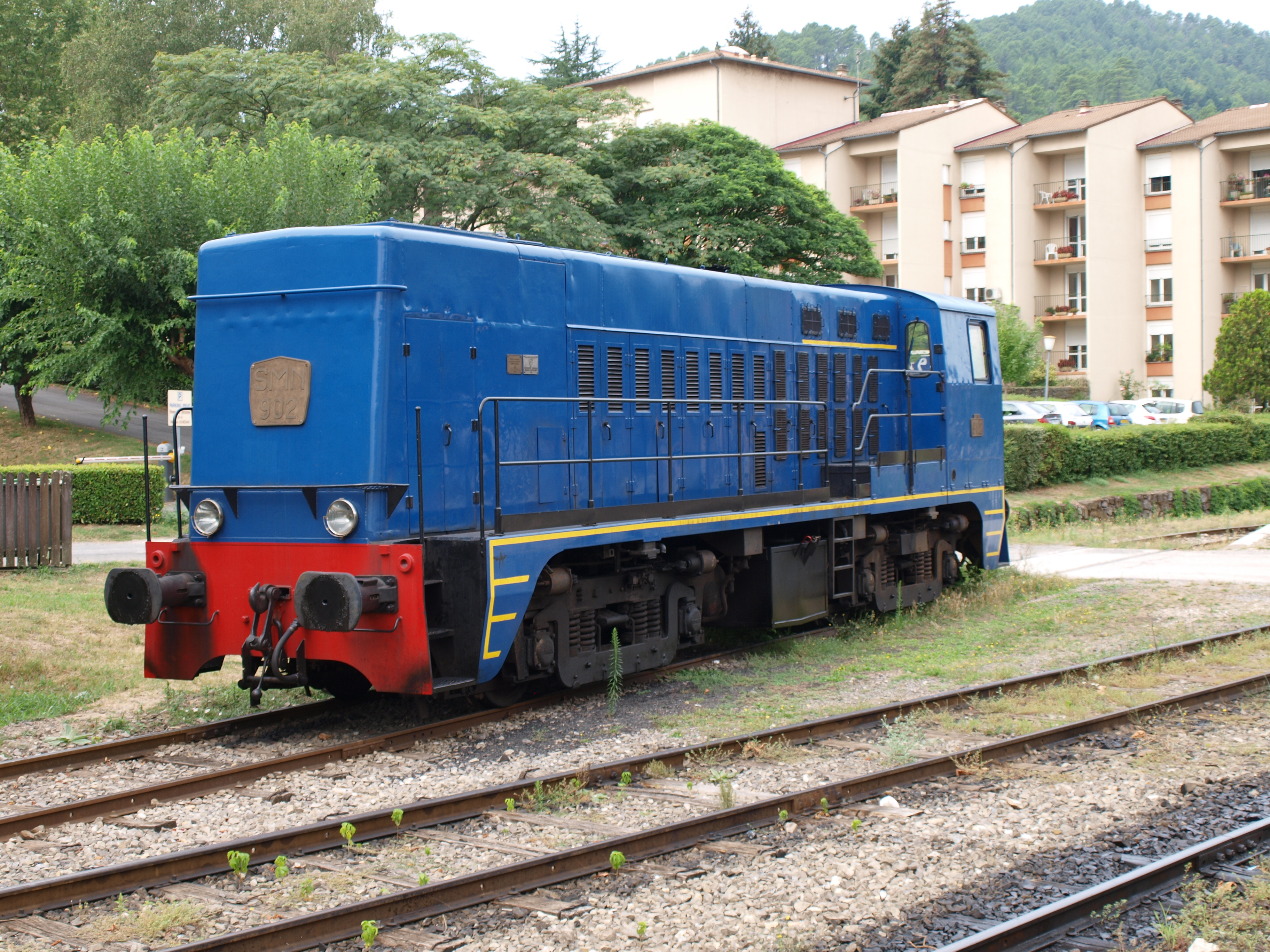 La locomotive Schneider 902 à la gare de St Jean du Gard